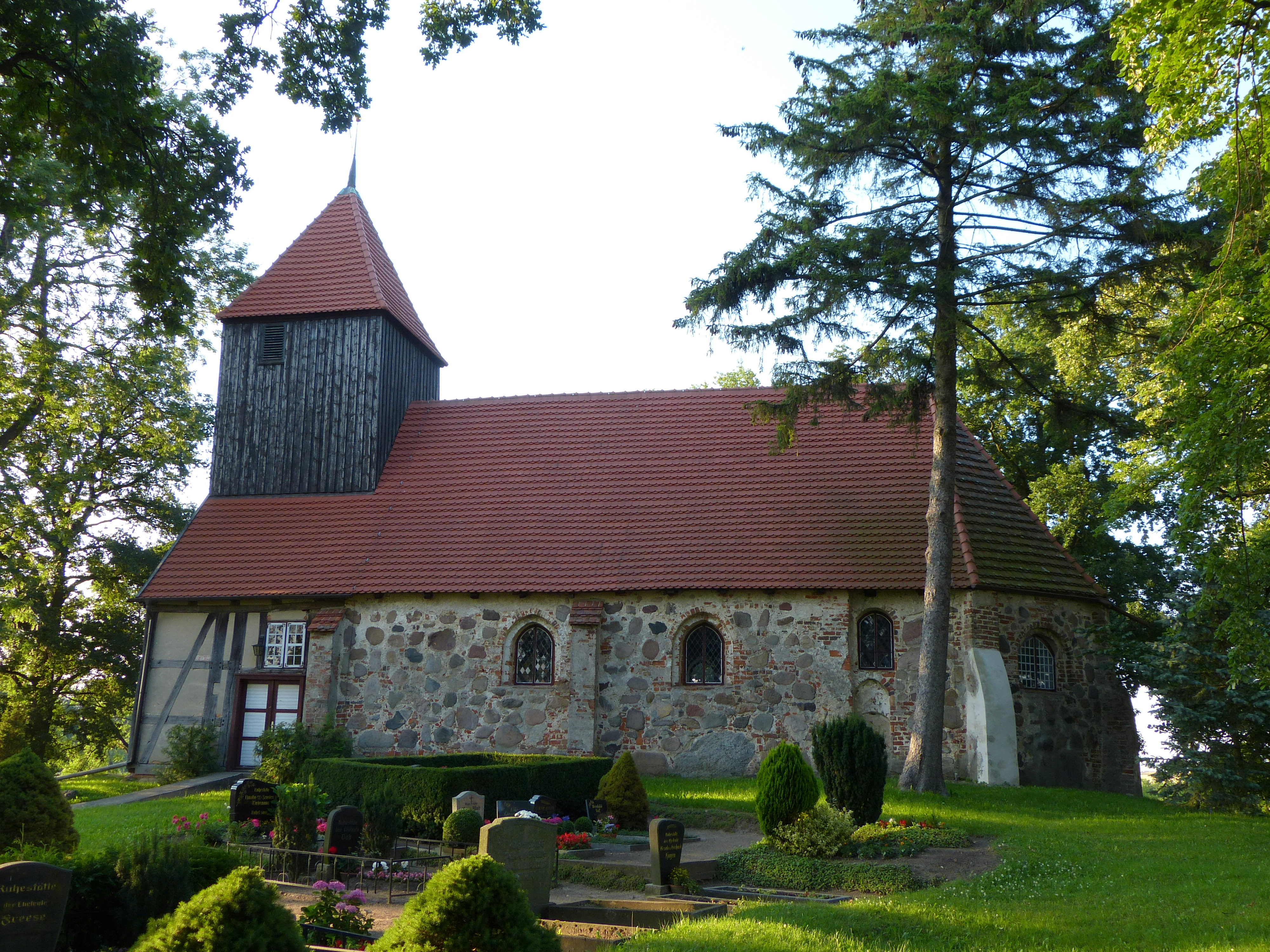 Kirche in Schwichtenberg, Gemeinde Borrentin, Südseite